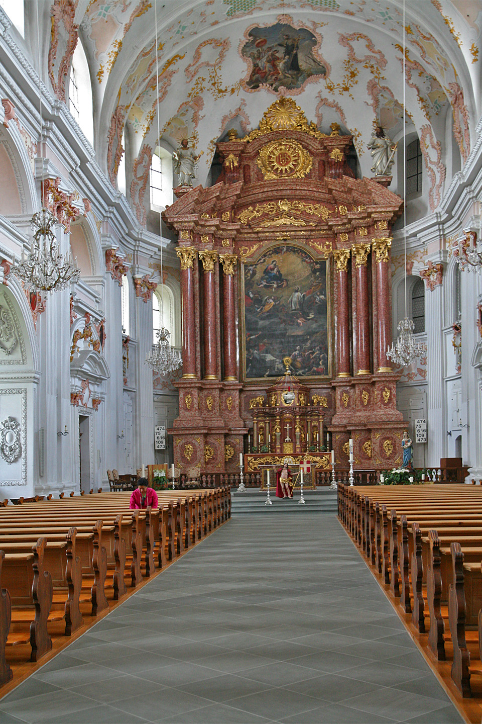 Jesuitenkirche St. Franz Xaver in Luzern. Die Barockkirche ist bedeutsam wegen ihrer reichen Ausstattung.